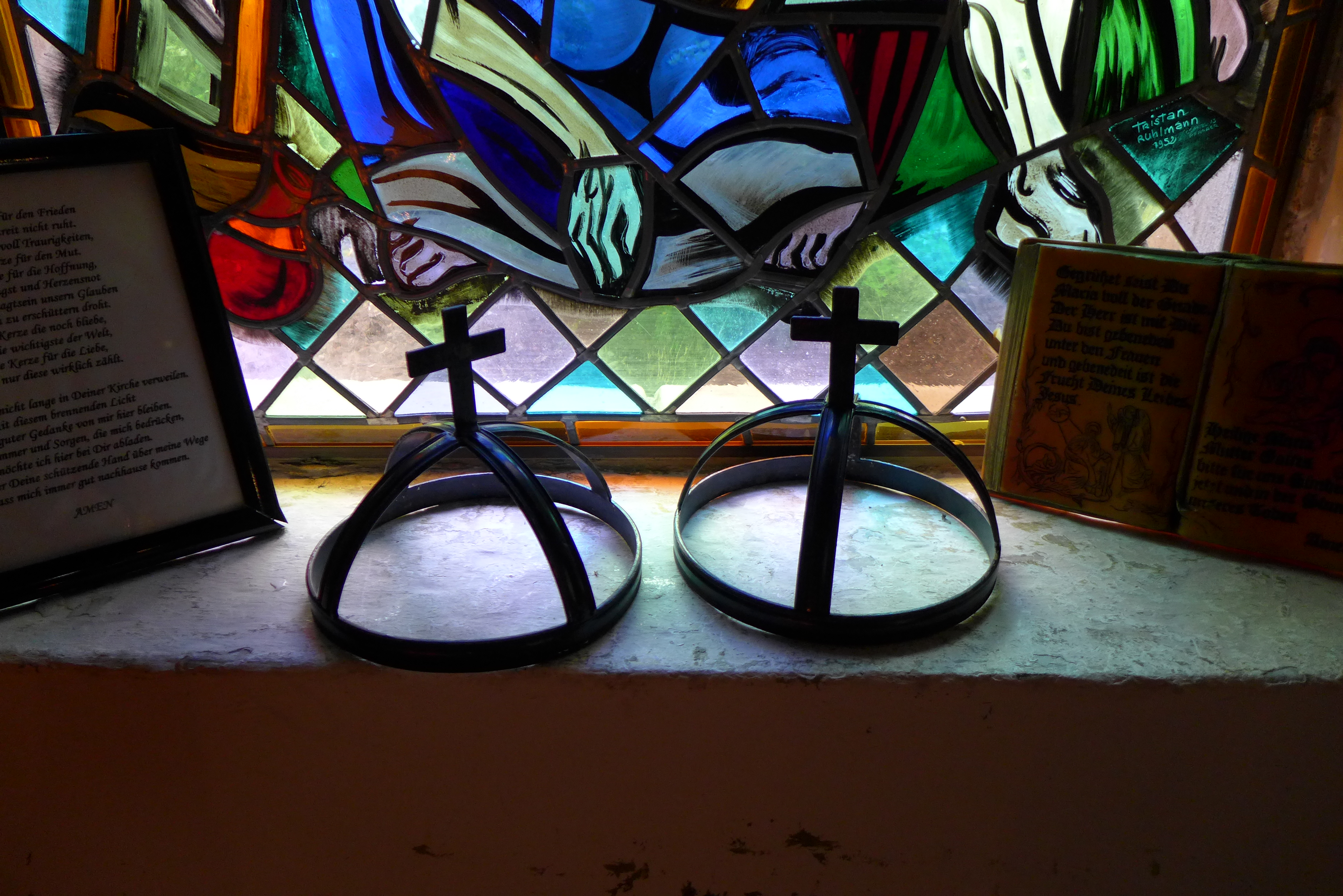 Orannakapelle (Berus), Oranna-Kronen